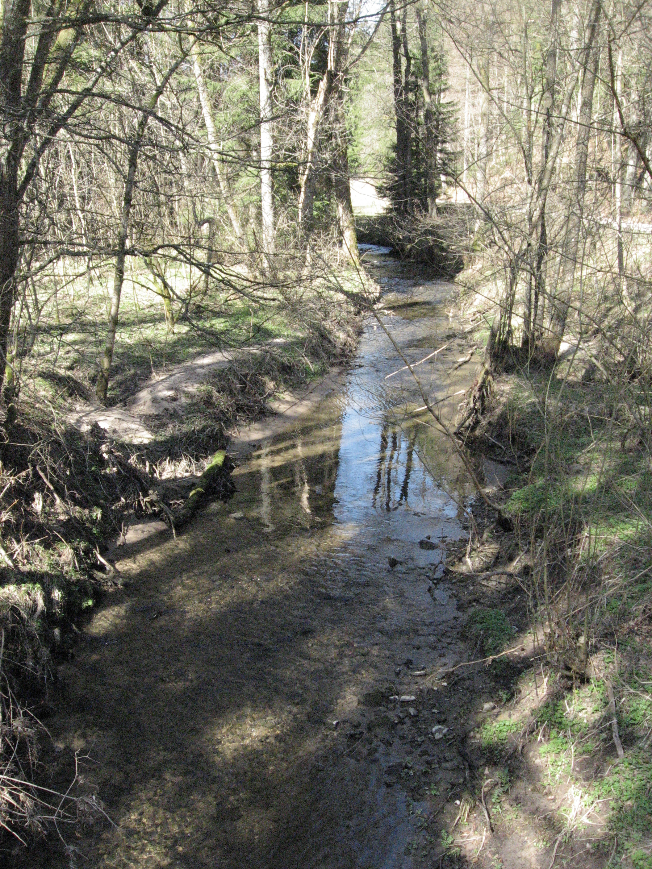 Die Blinde Rot in ihrem waldigen Tal wenig oberhalb der Dollesbach-Mündung zwischen Bühlerzell-Kammerstatt im Westen und Rosenberg-Hohenberg im Osten. Blick nach N von der Waldwegbrücke des sogenannten Kammerstatter Weges